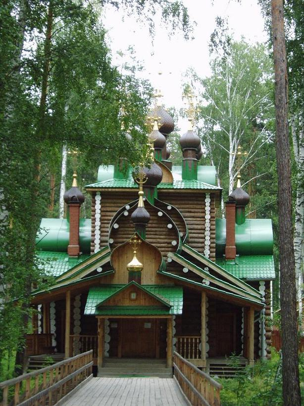 Kloostergebouwen in Ganina Jama (Oeral)